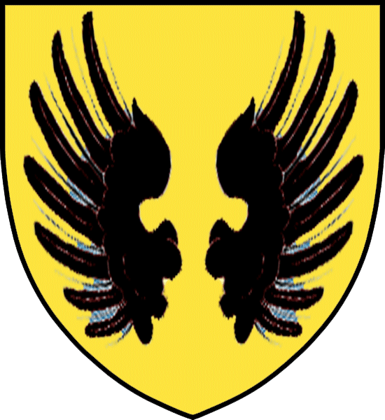 Vapensköld för adliga ätten Örnflycht nummr 84